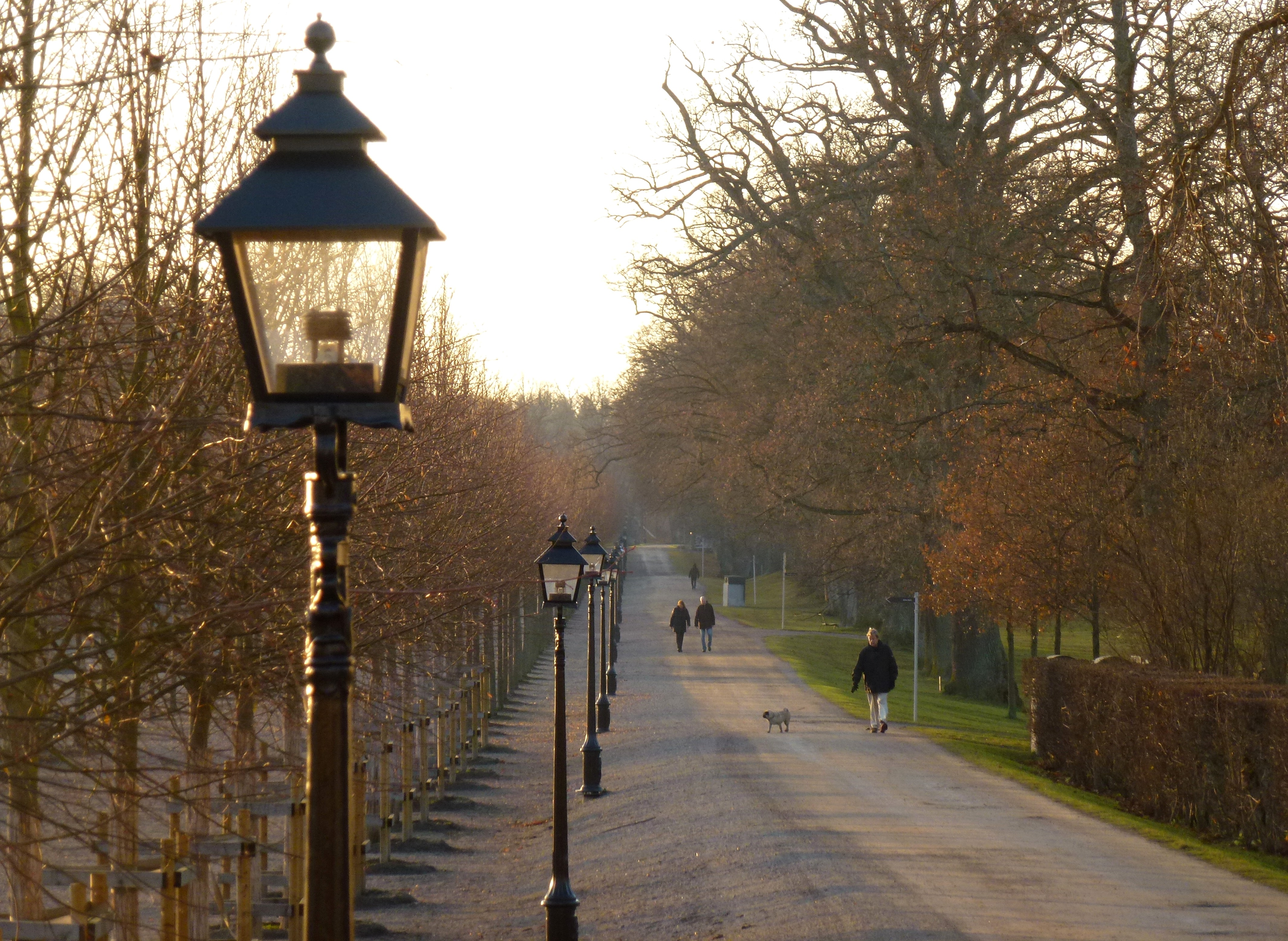 Drottningholms slott parkbelysning , lindallén